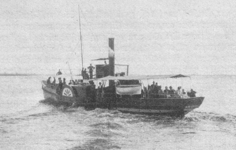 Der Ausflugsdampfer Primus, der am 21. Juli 1902 auf der Elbe in Hamburg sank. 101 Menschen kamen dabei ums Leben.